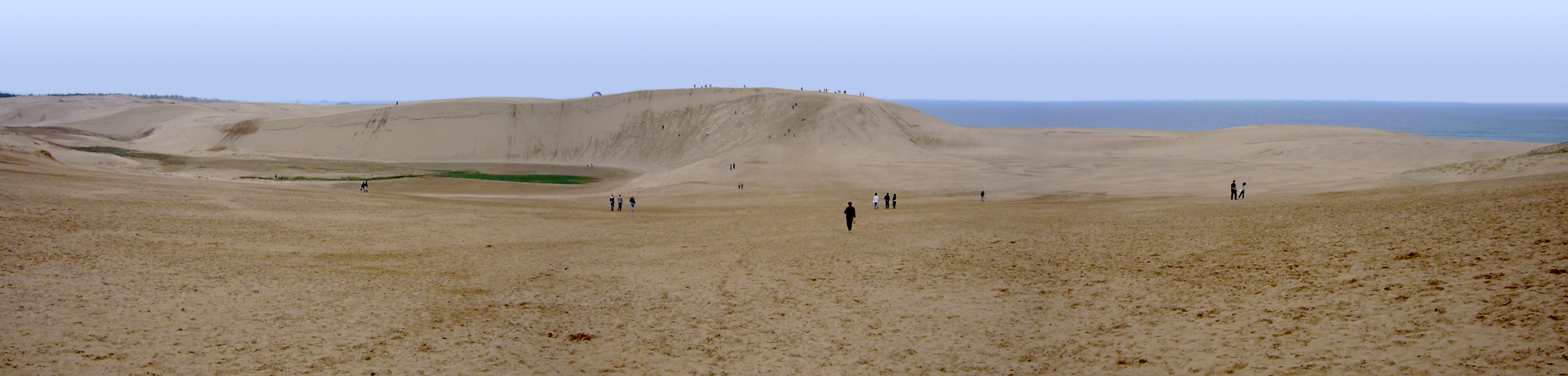 Tottori Sand Dune in Tottori, Tottori prefecture, Japan